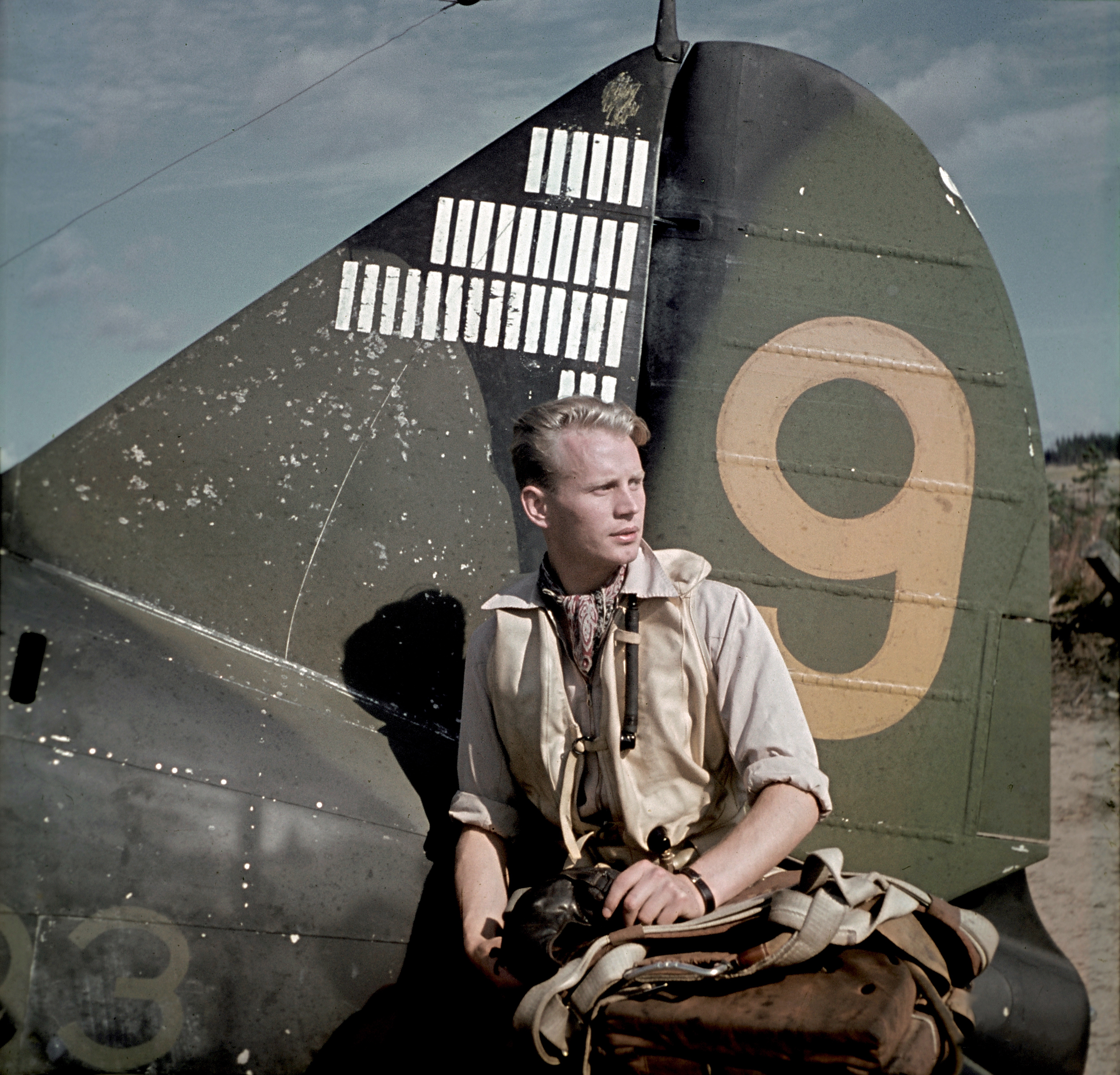 Luutnantti Hans Wind, Mannerheimristin ritari, kuuluisa hävittäjälentäjämme, joka on ampunut alas 33 1/2 viholliskonetta.